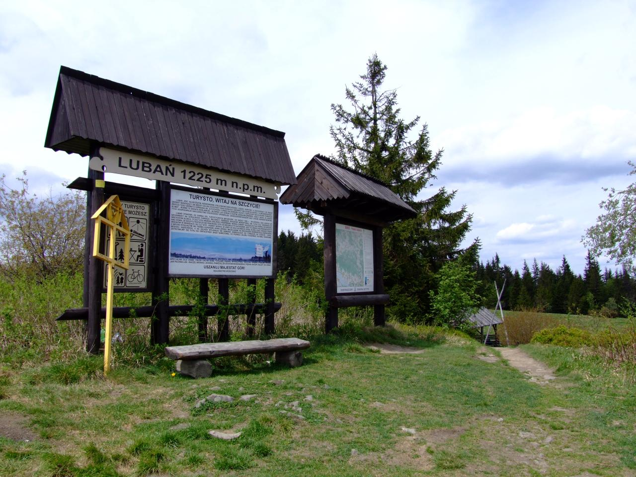 Tablice informacyjne przy polanie Wierch Lubania w Gorcach